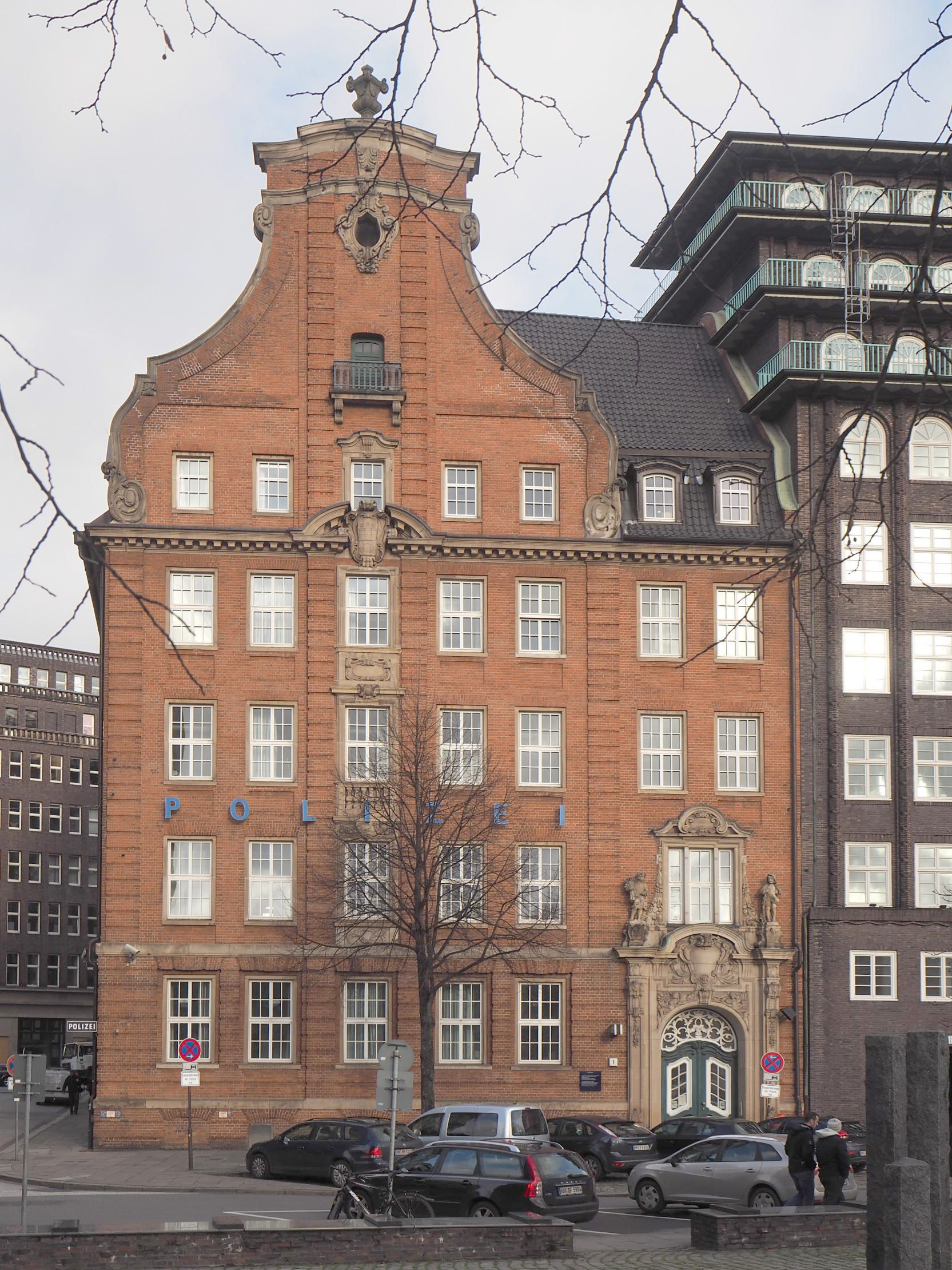 Hamburg, Ehem. Haus der Landherrenschaften, Foto: 2015 This is a photograph of an architectural monument.